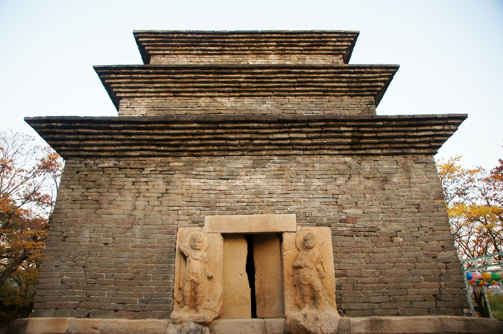 분황사 모전석탑